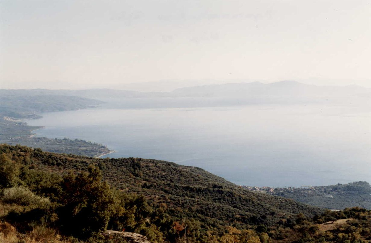 Περιγραφή: Η ανατολική πλευρά του Παγασητικού Κόλπου φωτογραφημένη από τον δρόμο που ενώνει τα χωριά του Πηλίου Άγιο Γεώργιο Νηλείας και Πινακάτες. Δημιουργός: Χρήστης Flashdart2 Ημερομηνία: Νοέμβριος 1998